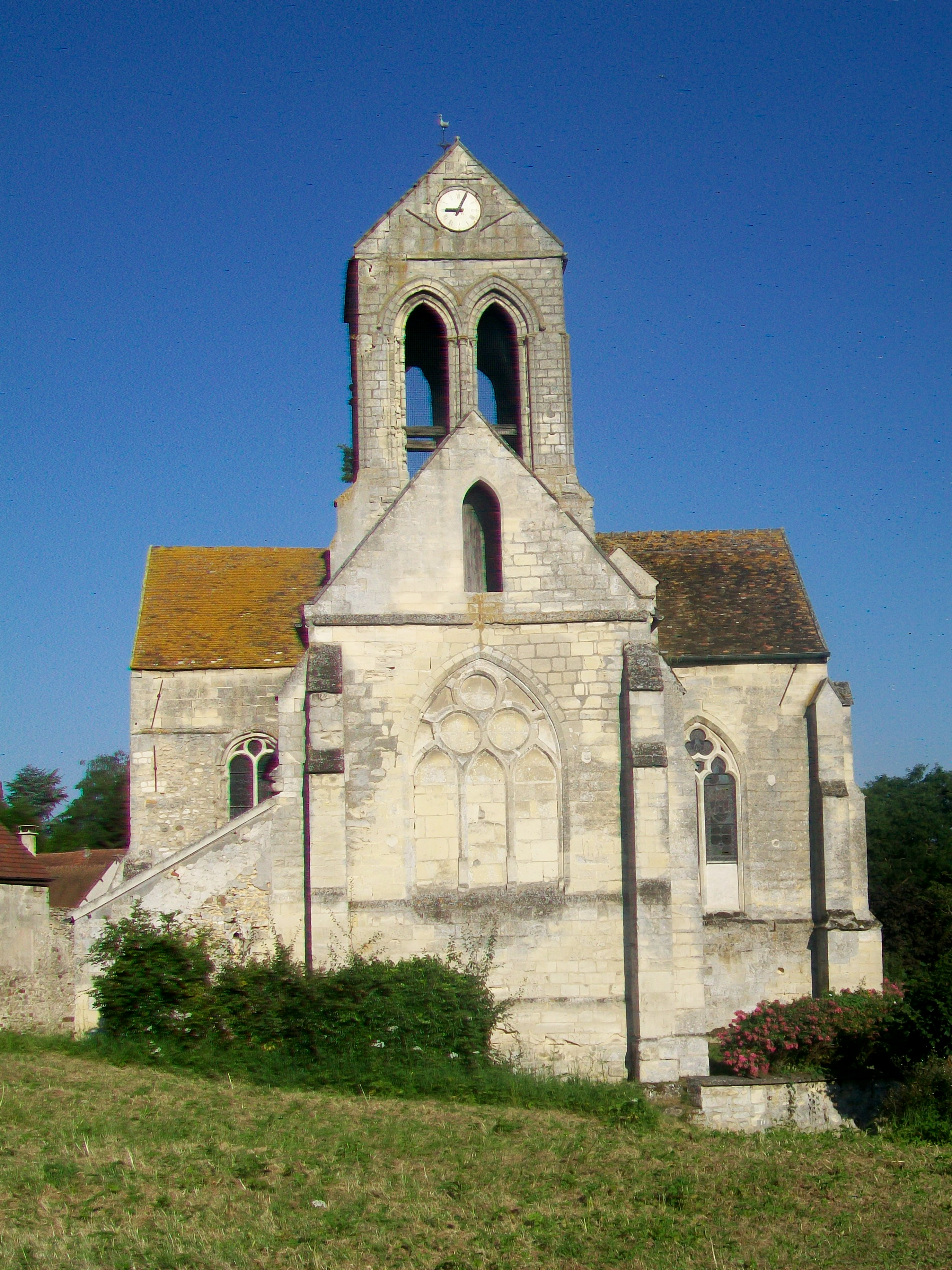 Le chevet et le clocher, depuis l'est.